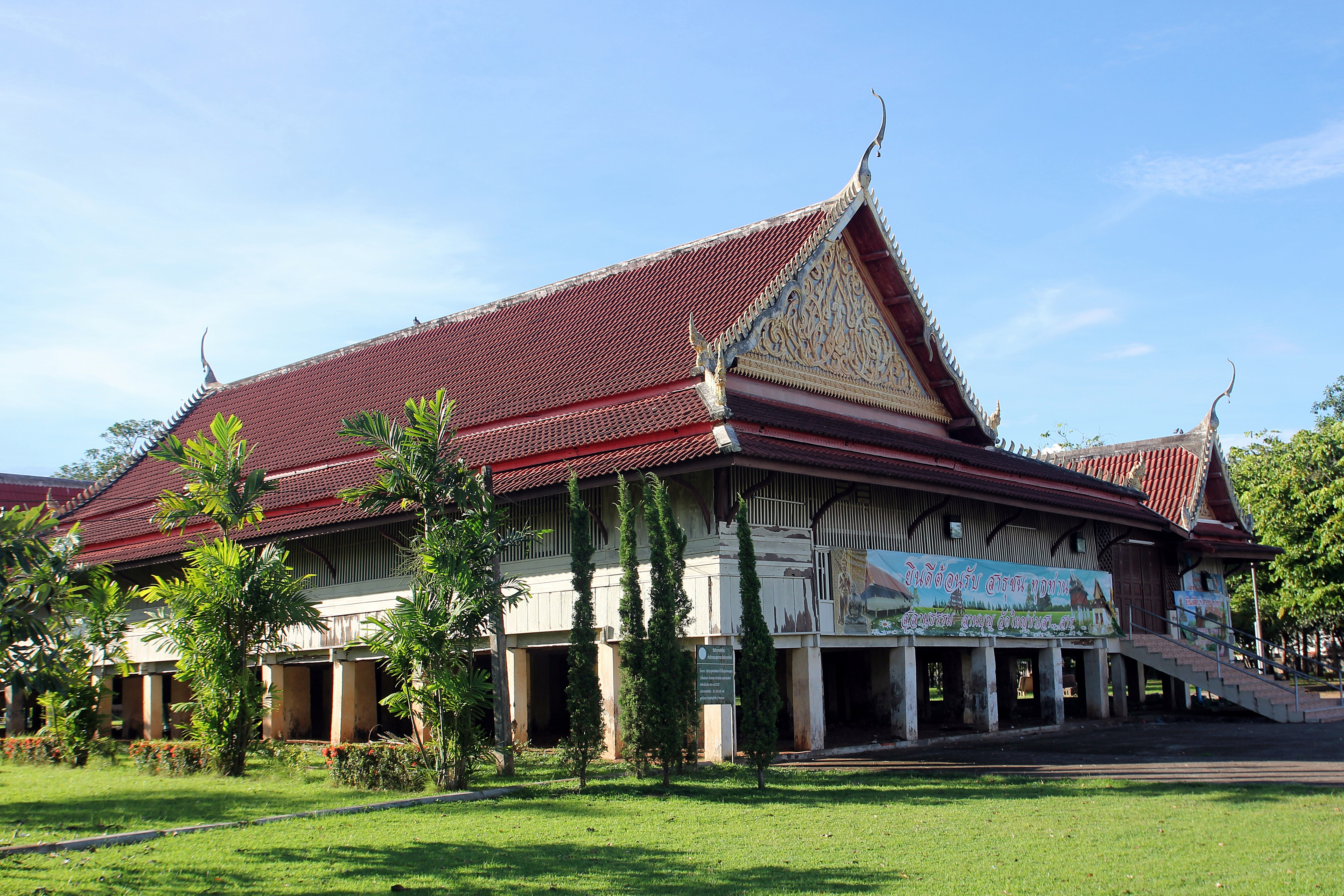 วัดใหญ่ท่าเสา